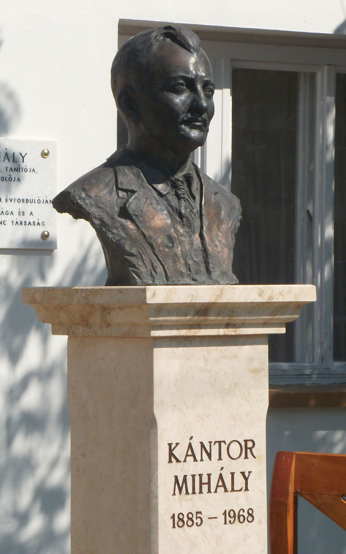 Kántor Mihály bronzból készült mellszobra, a róla elnevezett általános iskola előtti utcafronton. Czigándi Varga Sándor alkotása (2012)